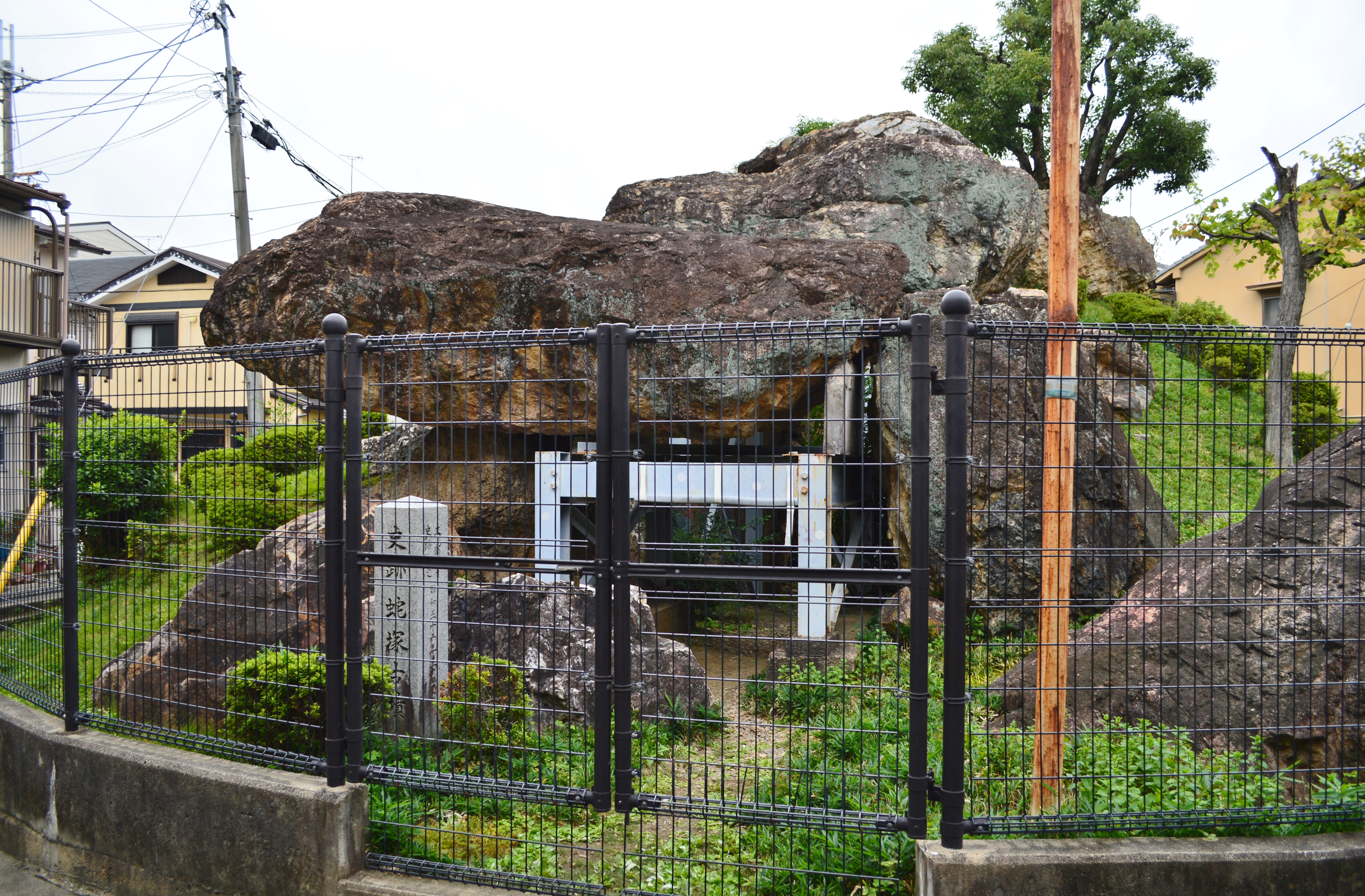 蛇塚古墳 石室入り口